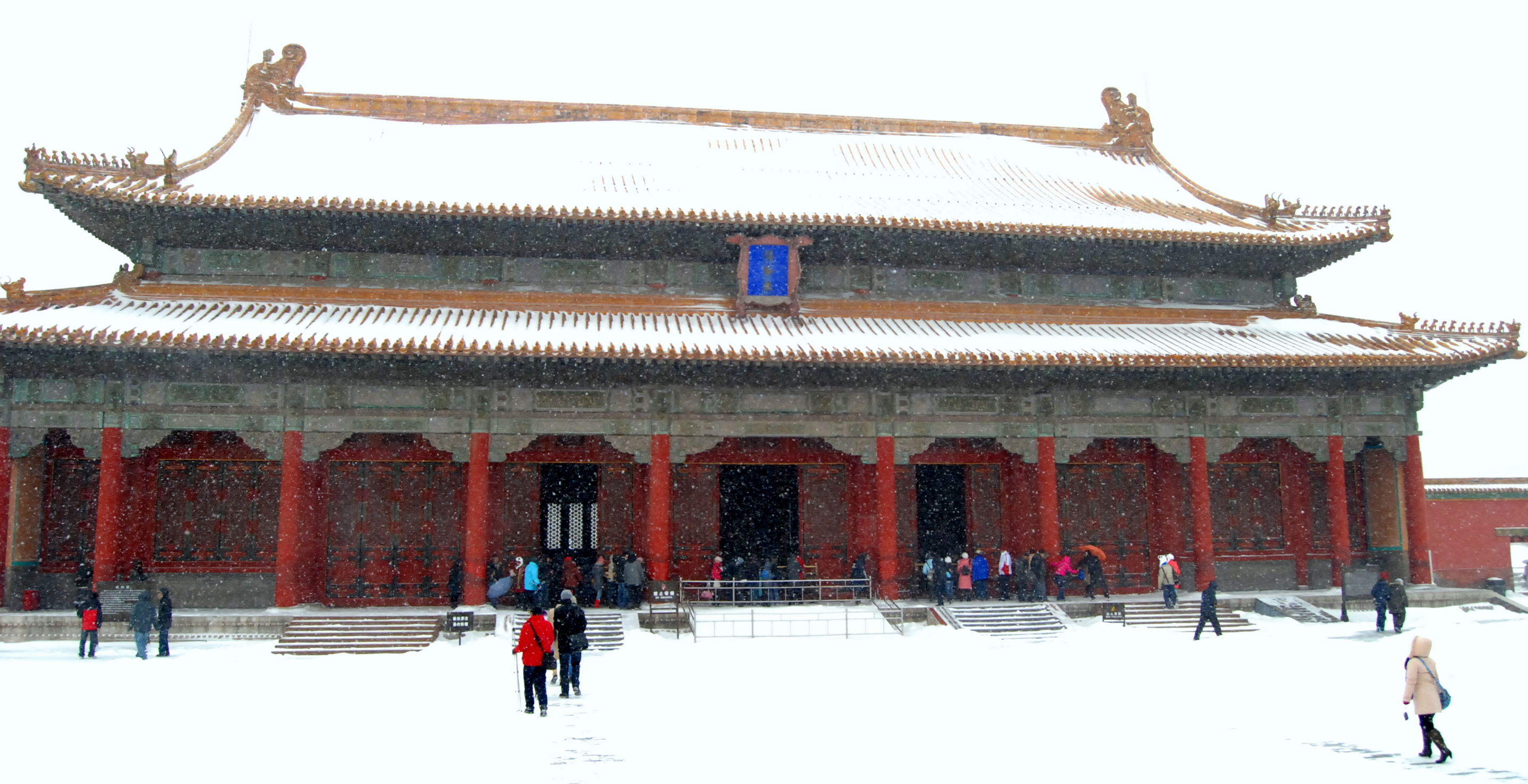 中文（中国大陆）: 雪中紫禁城